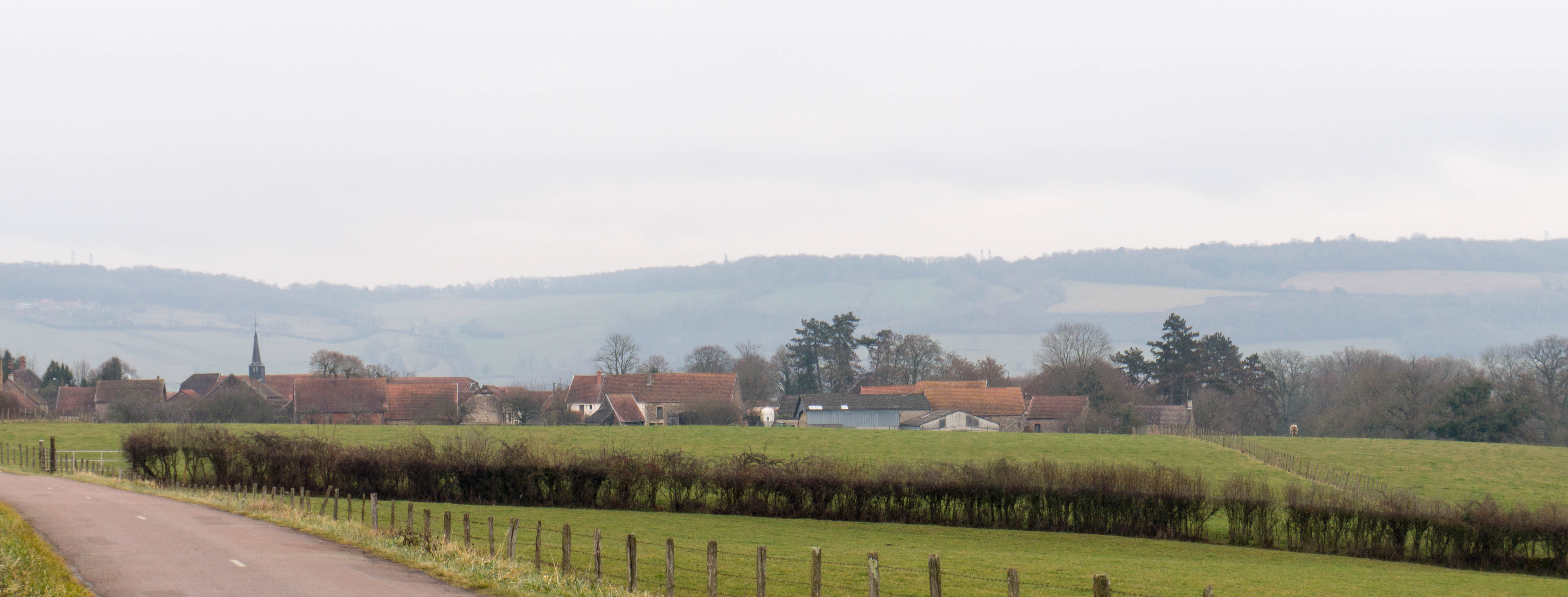 Dracy (Marcilly-et-Dracy) vu depuis la route reliant Dracy à Marcilly